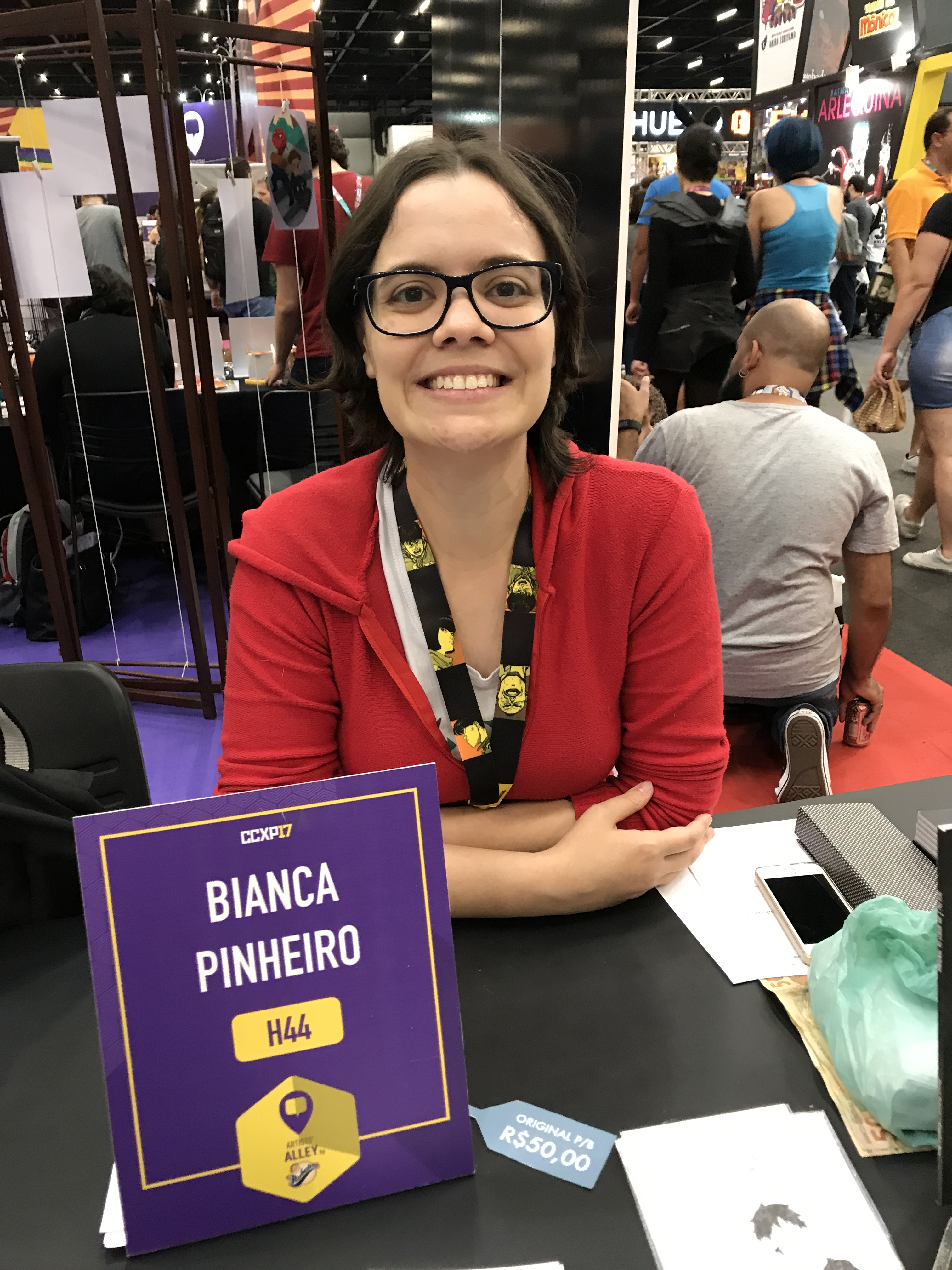 Artista Bianca Pinheiro na edição de 2017 da Comic Con Experience